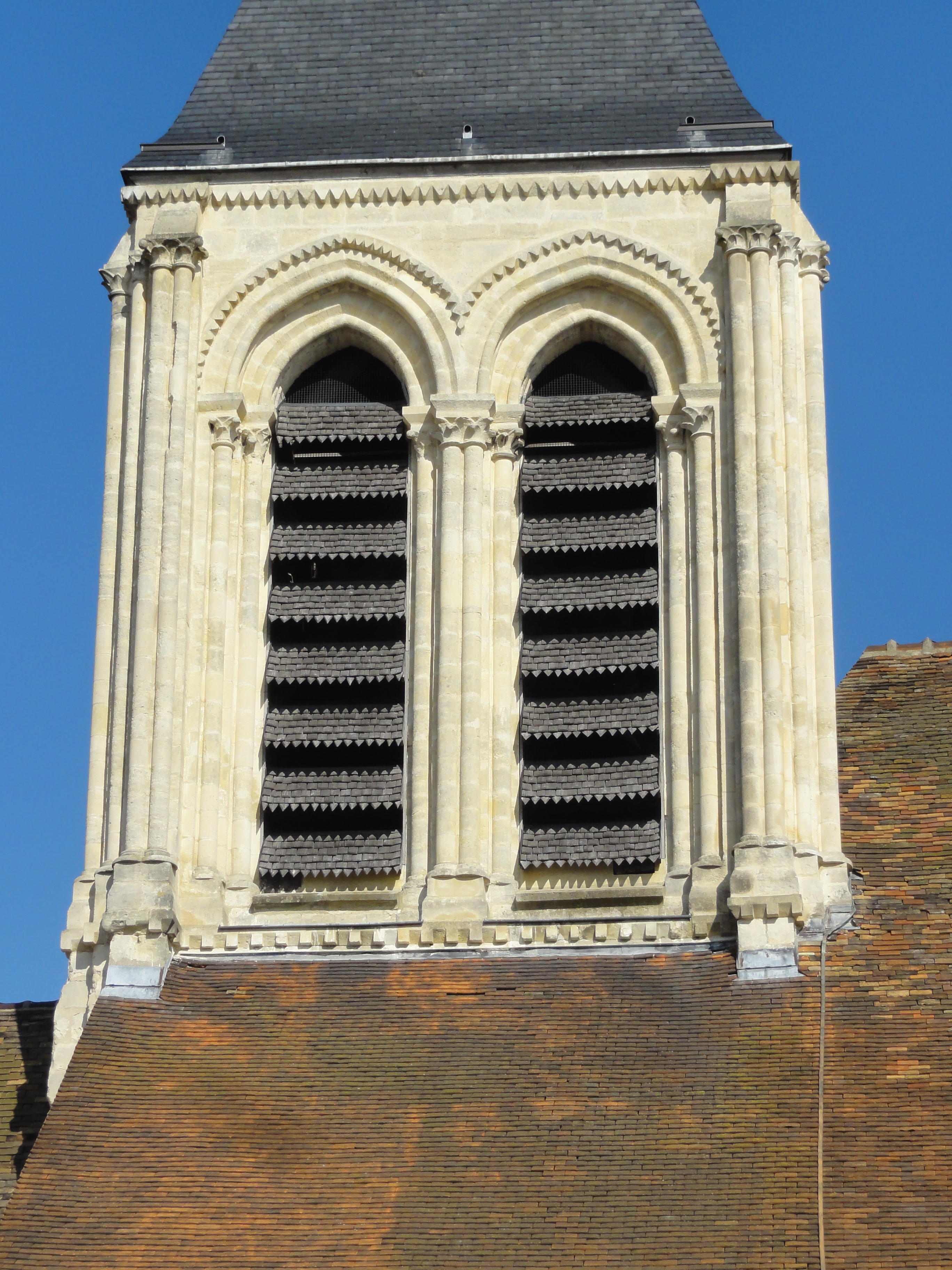 Clocher.